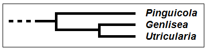 Lentibulariaceae - Cladogramma della famiglia